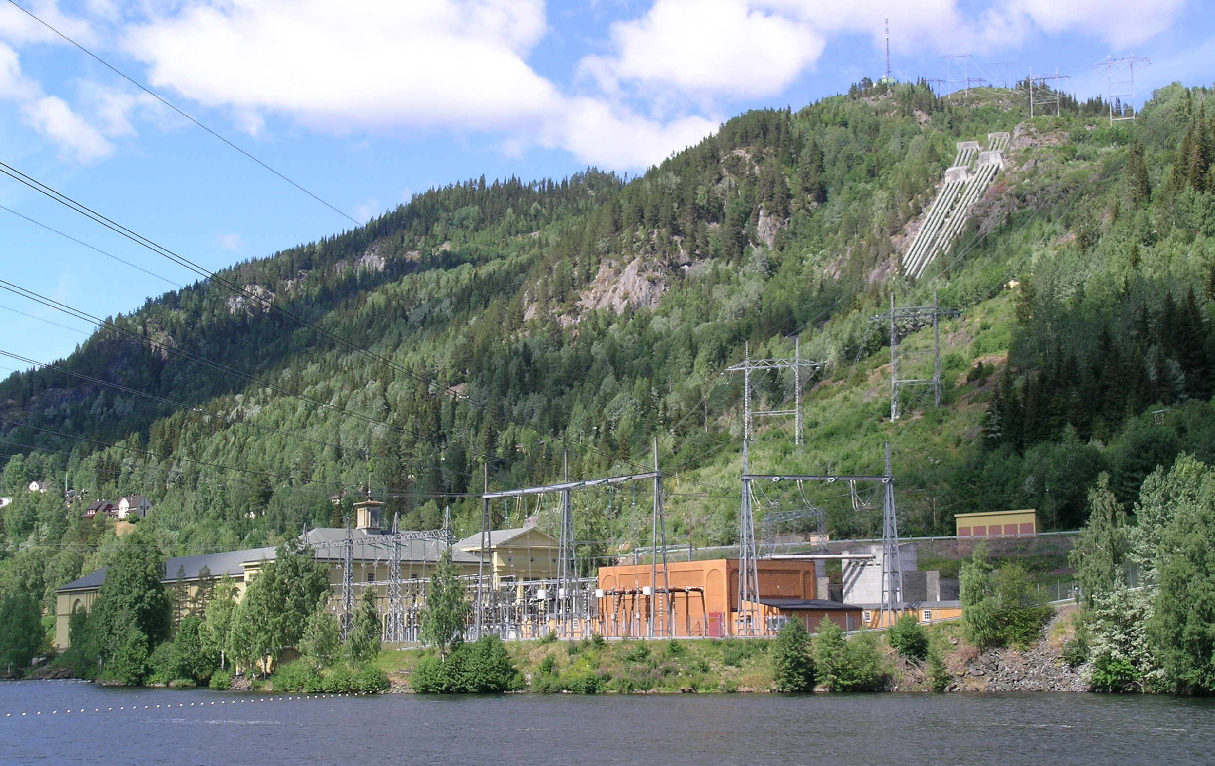 Nore I. Nore og Uvdal, Buskerud, Norway.